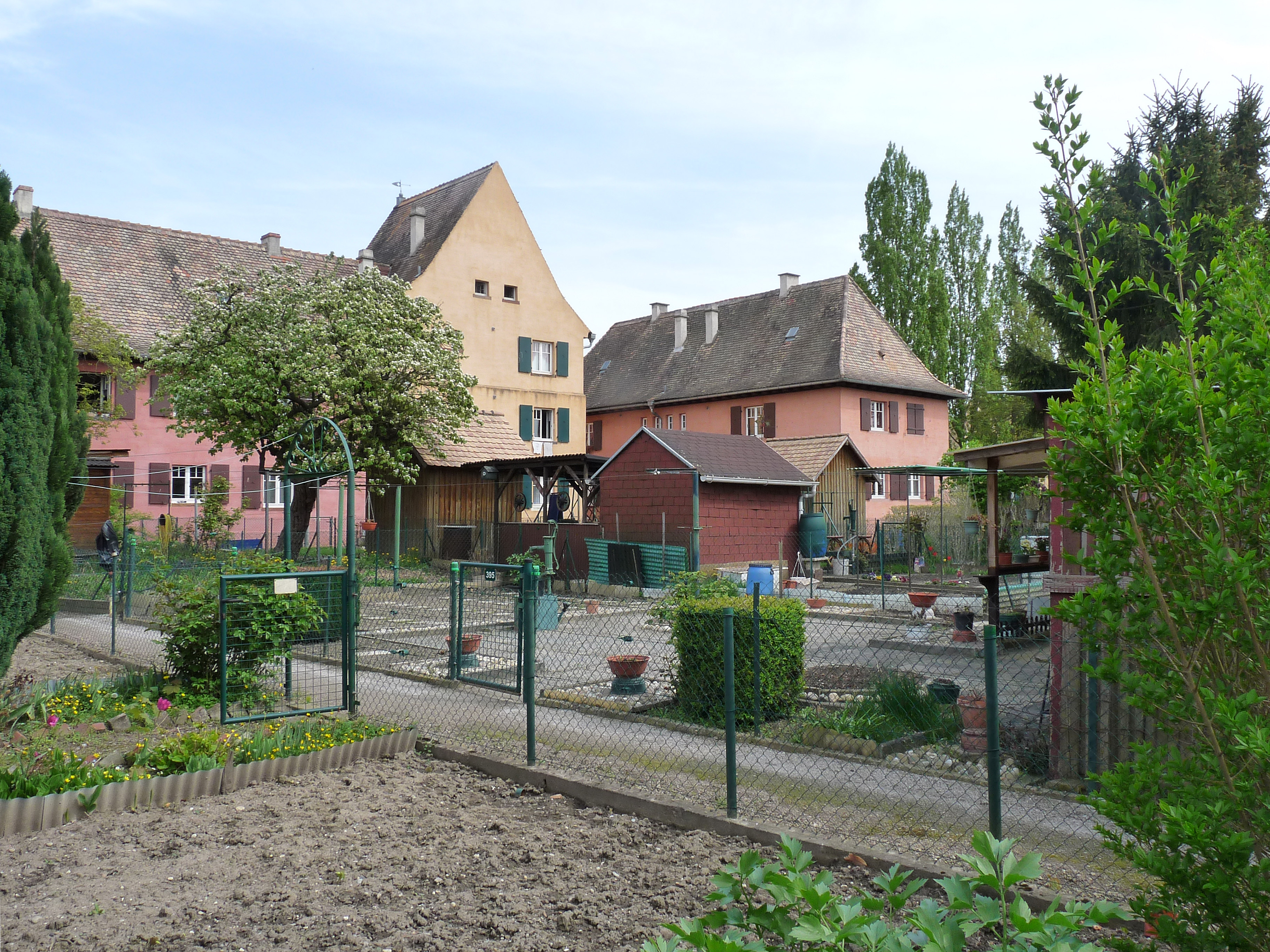 Strasbourg-Neuhof : cité-jardin du Stockfeld ; construction 1910-1912 ; architecte : Edouard Schimpf (mort en 1916) ; inscrit aux MH en 1996 ; rénovation en 2005